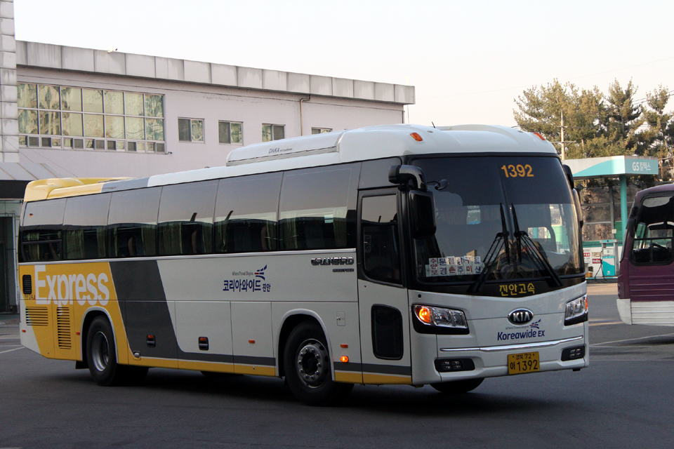 기아 이노베이션 그랜버드 유로6 그린필드 정측면